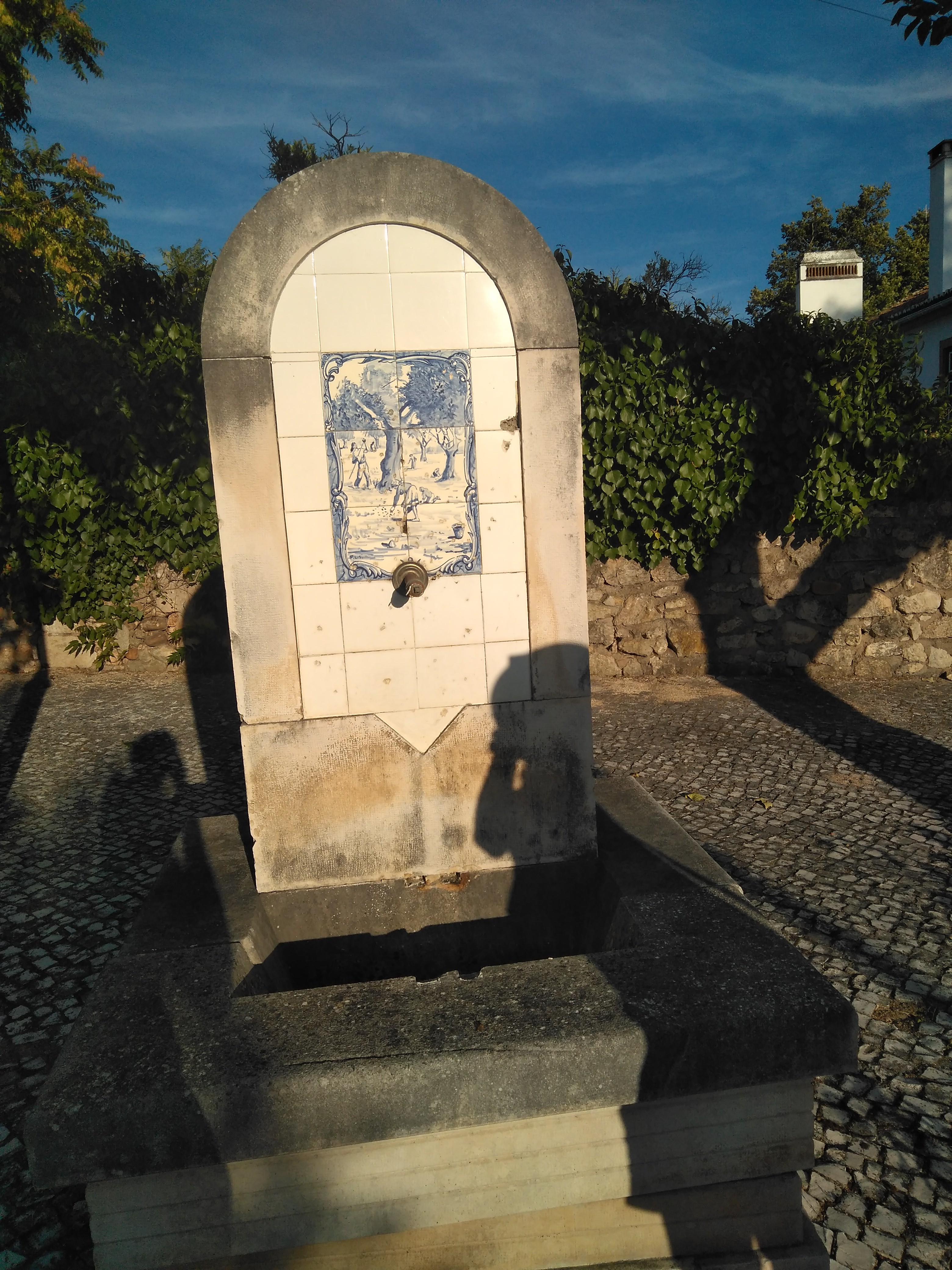 fuente en Atalaia, Vila Nova da Barquinha. Portugal